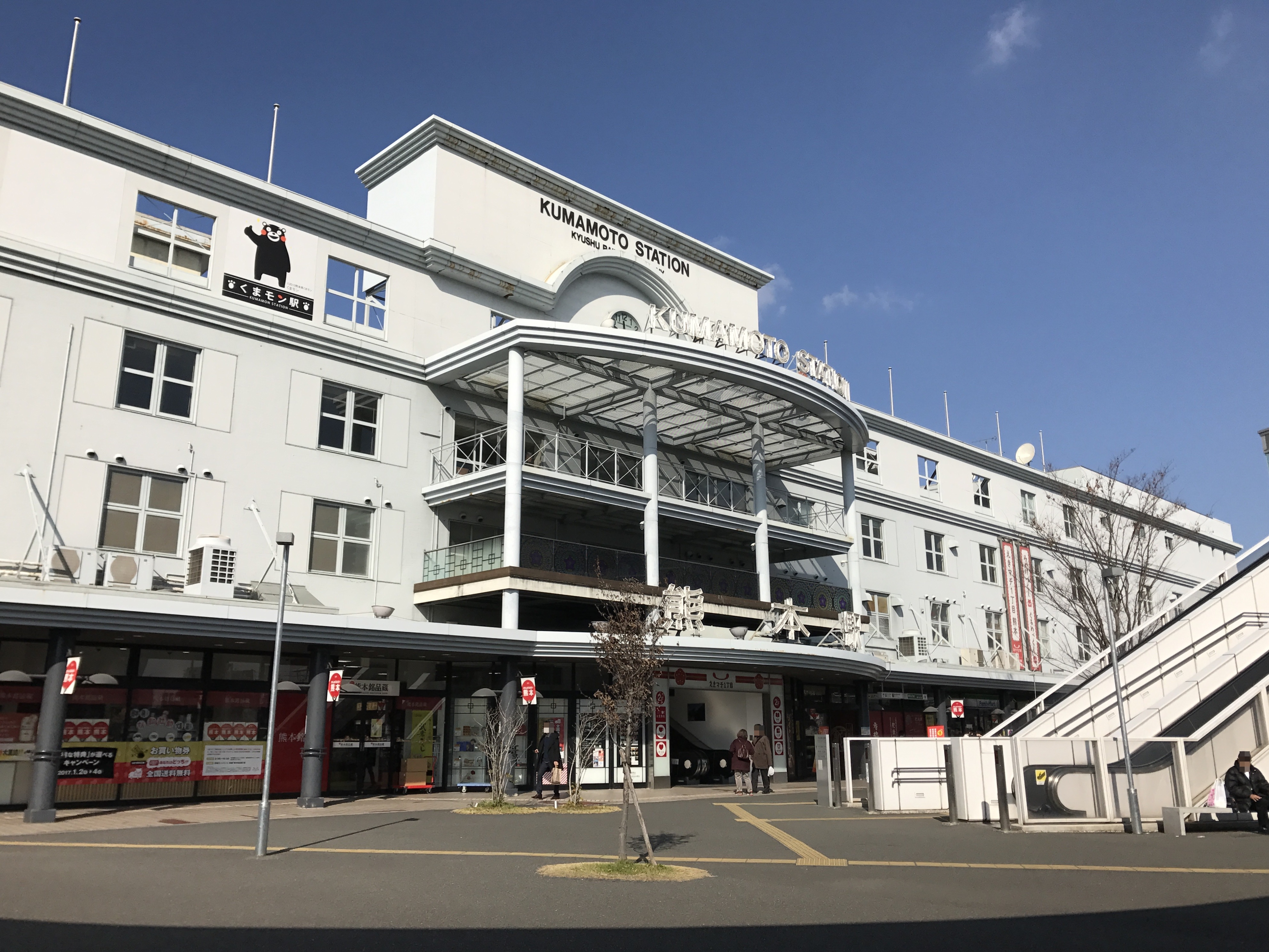 熊本駅の白川口